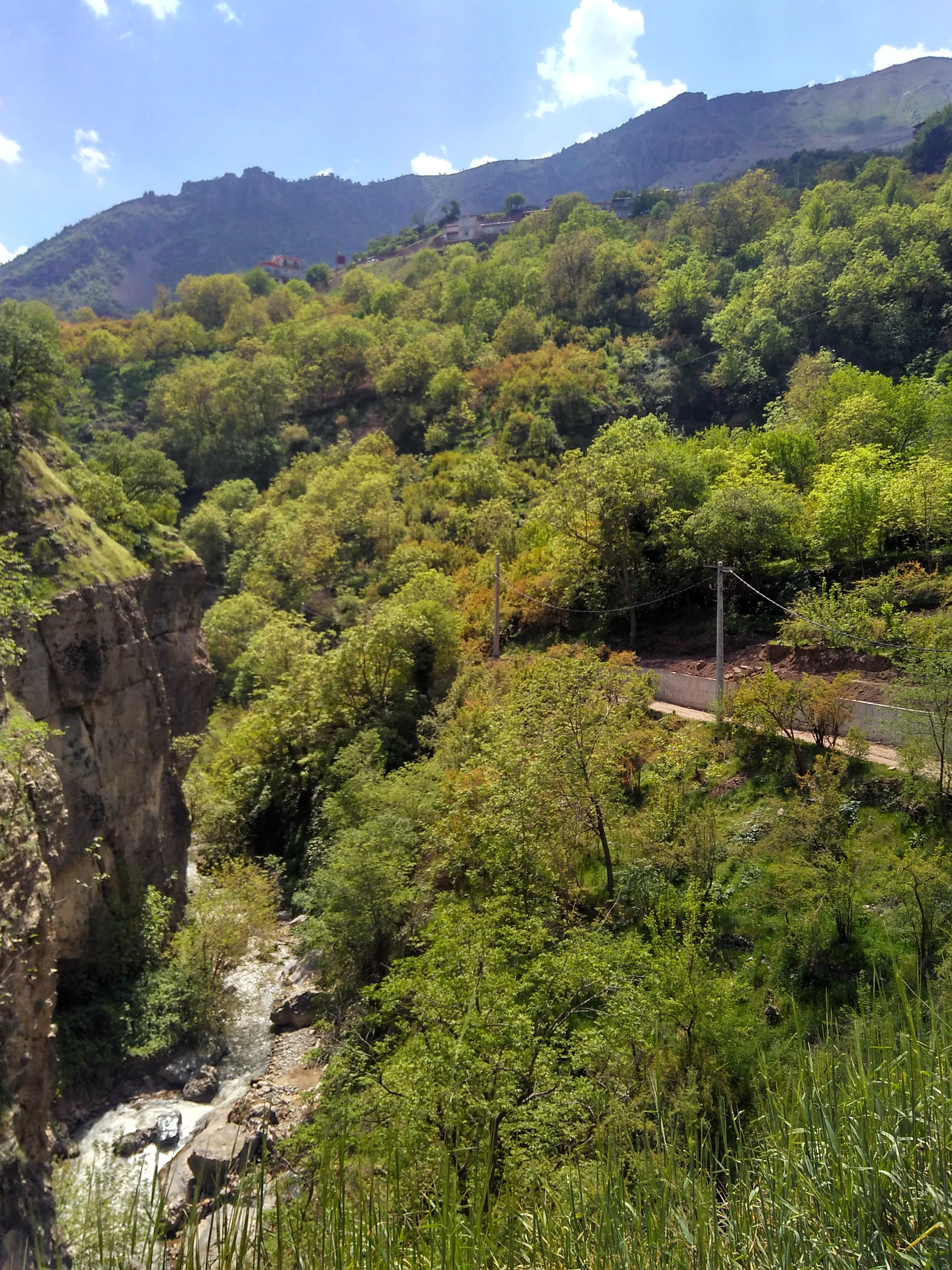 طبیعت روستای دشه واقع در شهرستان پاوه کرمانشاه در فصل بهار (پانزدهم فروردین سال ۱۳۹۷)